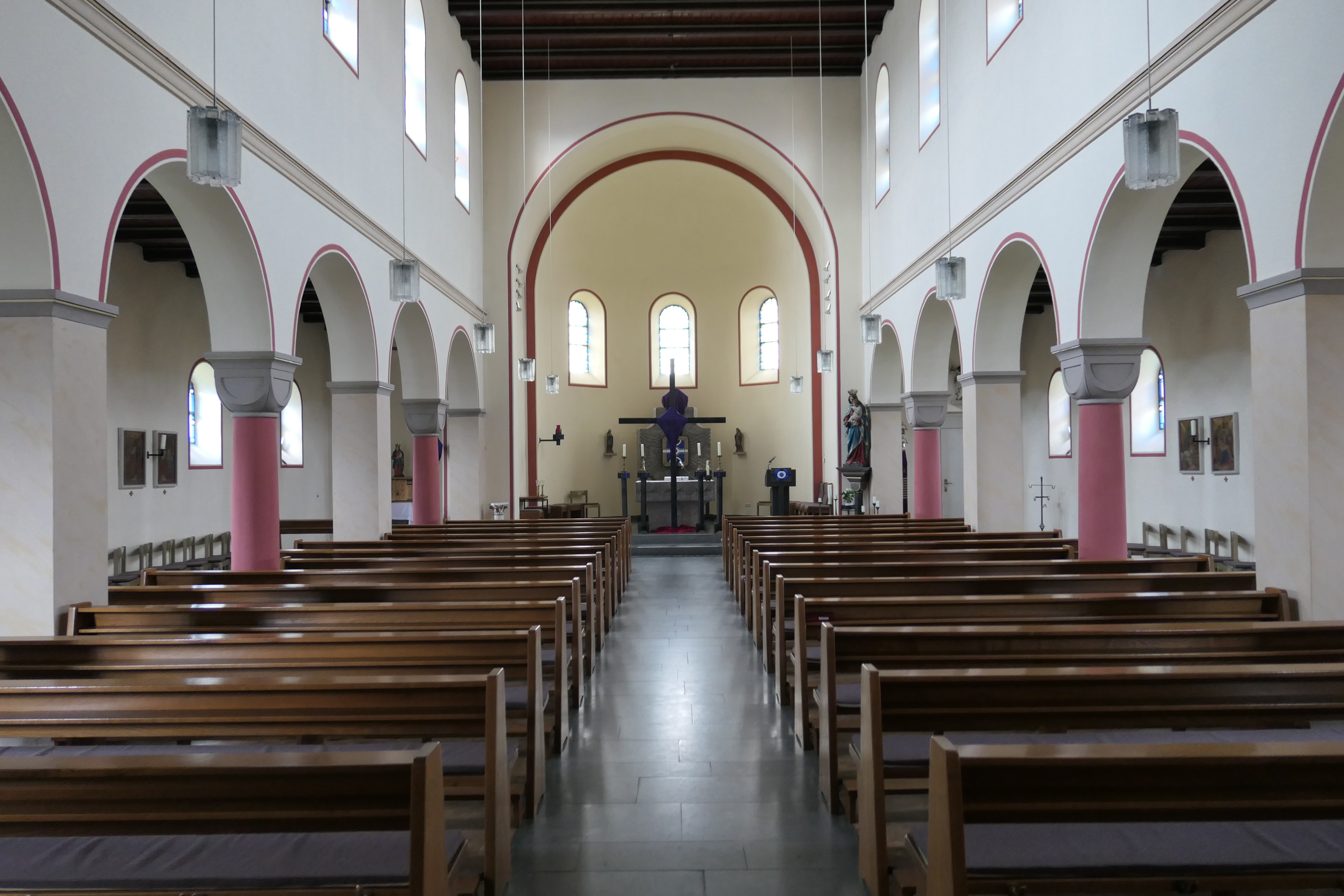 Inneres der kath. Pfarrkirche St. Mariä Unbefleckte Empfängnis, HI-Bavensted